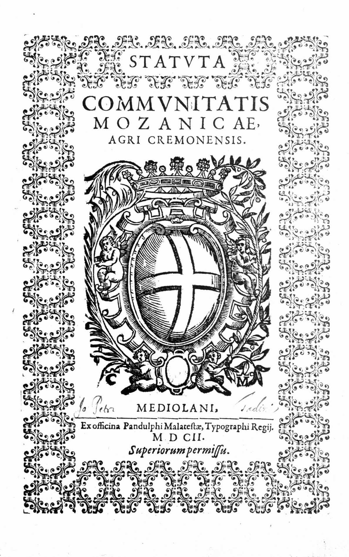 Frontespizio